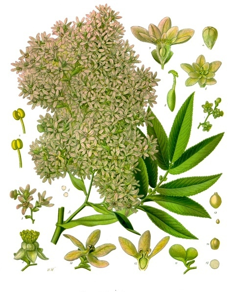 Kosobaum. A blühendes Zweigstück mit weiblicher Blüthenrispe in natürl. Grösse; 1 Ast der männlichen Blüthenrispe, desgl.; 2 Knospe der männlichen Blüthe, vergrössert; 3 männliche Blüthe, desgl.; 4 Staubgefässe, desgl.; 5 Pollen, desgl.; 6 weibliche Blüthe, desgl.; 7 dieselbe im Längsschnitt, desgl.; 8 Stempel, desgl.; 9 Fruchtzweig, nat. Grösse; 10 verblühte Blüthe, vergrössert; 11 Frucht mit den Deckblättern, desgl.; 12 dieselbe im Längsschnitt, desgl.; 13 Früchtchen, natürl. Grösse und vergrössert; 14 Früchtchen ohne Fruchtgehäuse, vergrössert; 15 dasselbe im Querschnitt, desgl.